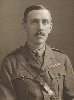 Фотография подполковника Фредерика Маршмана Бейли (Frederick Marshman Bailey), 1934 год